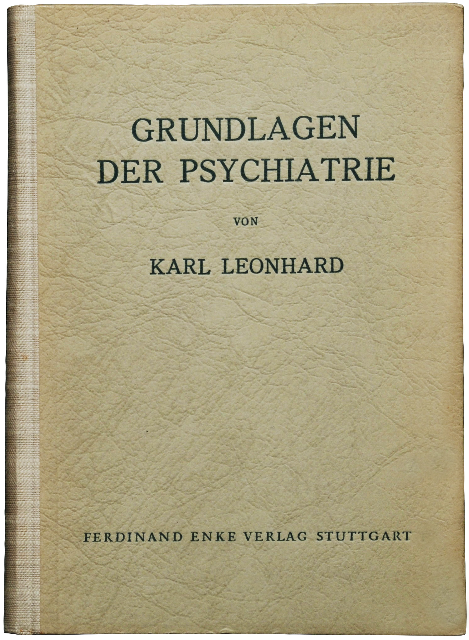 Leonhard, Karl: Grundlagen der Psychiatrie. Mit 4 Abbildungen. Stuttgart: F. Enke 1948, XI Seiten + 246 Seiten, 1.Auflage. Original-Halbleinen (Buchdeckel 21,4 x 14,7 cm) mit Rückenlängstitel. Erstausgabe.